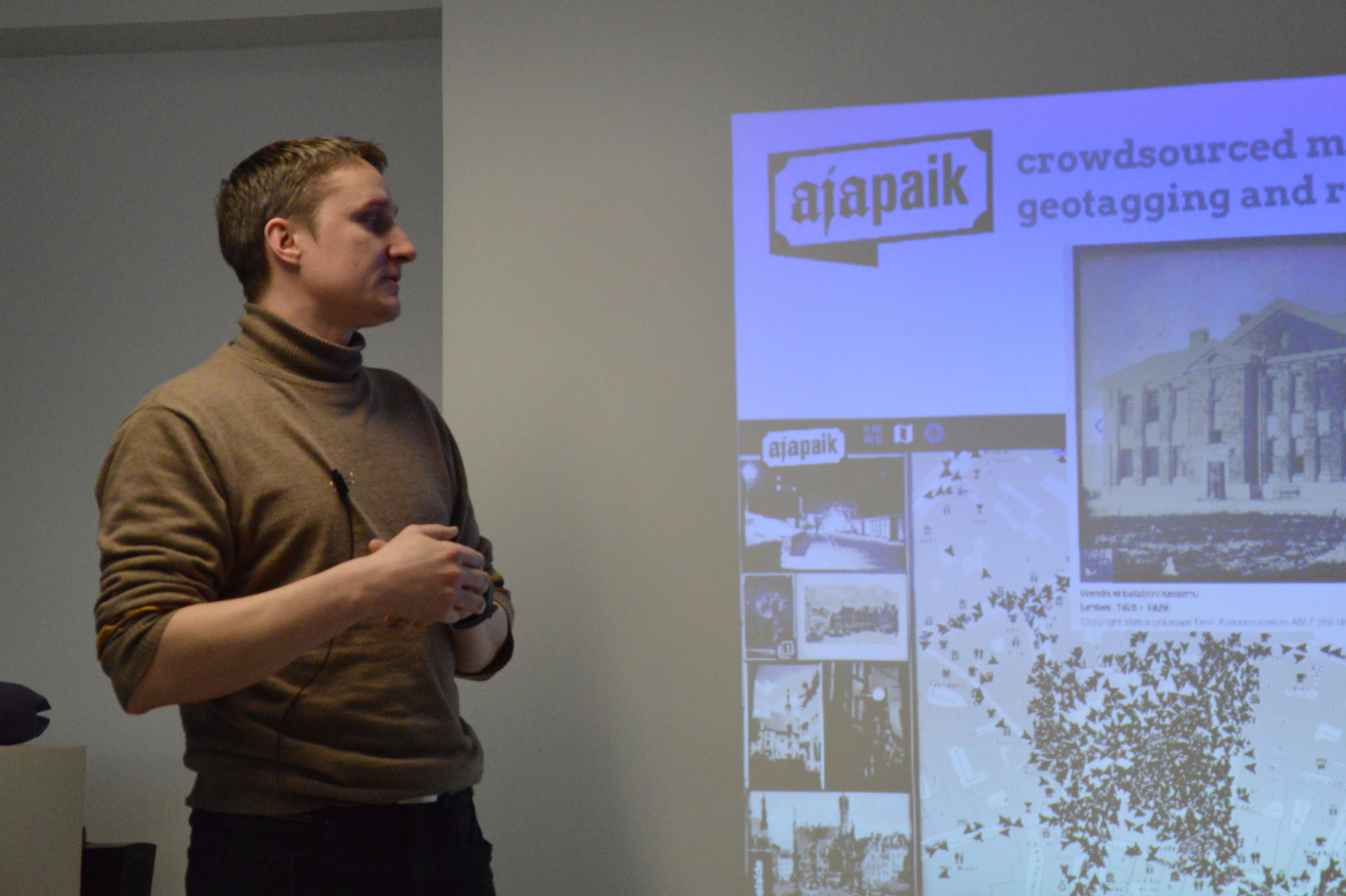 Avaandmete päev Tallinnas. Vahur Puik tutvustamas keskkonda Ajapaik.